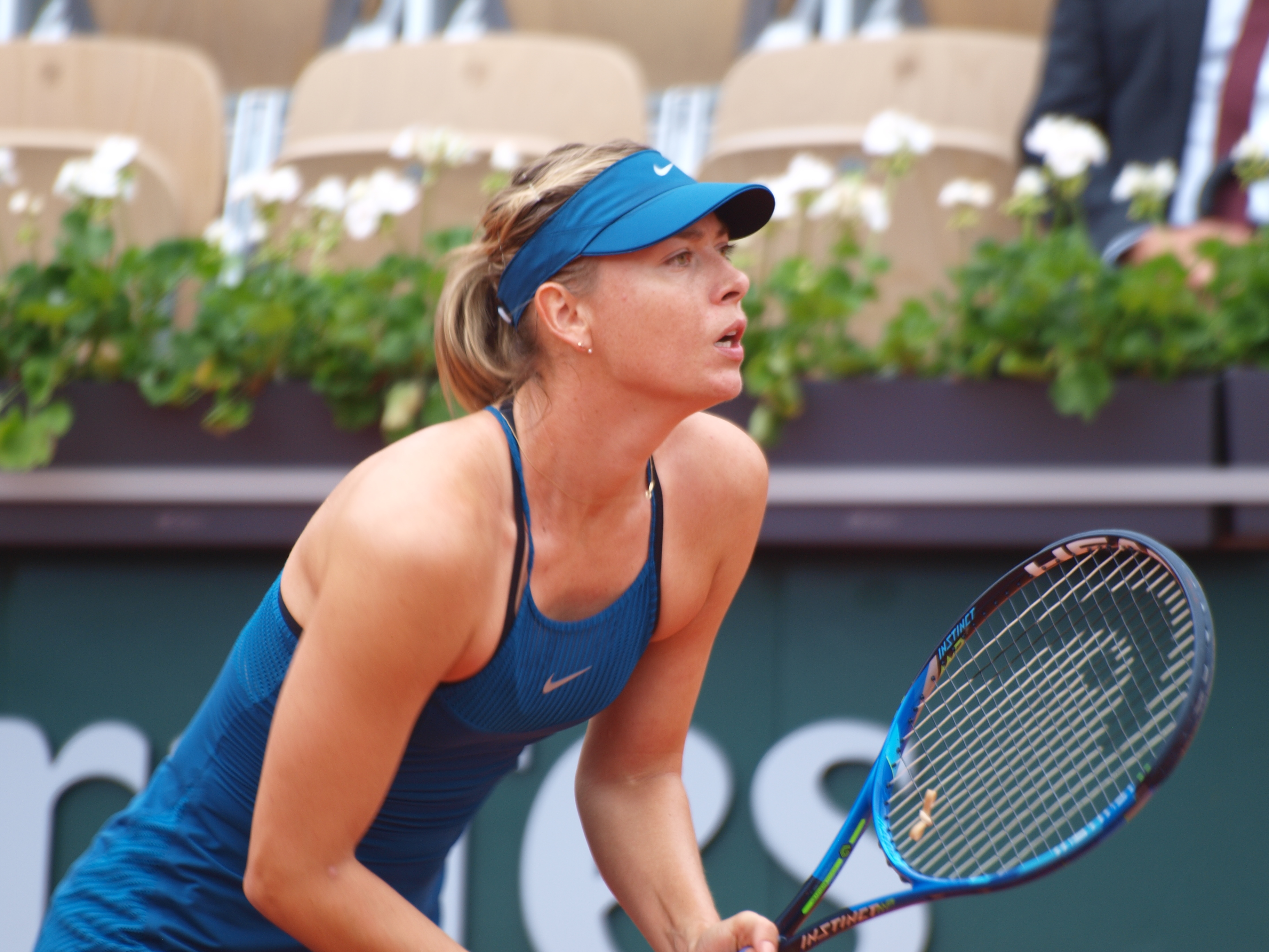 Maria Sharapova, durant le match du 29 mai 2018, sur le court Lenglen (stade Roland Garros) en compétition contre Richèl Hogenkamp.